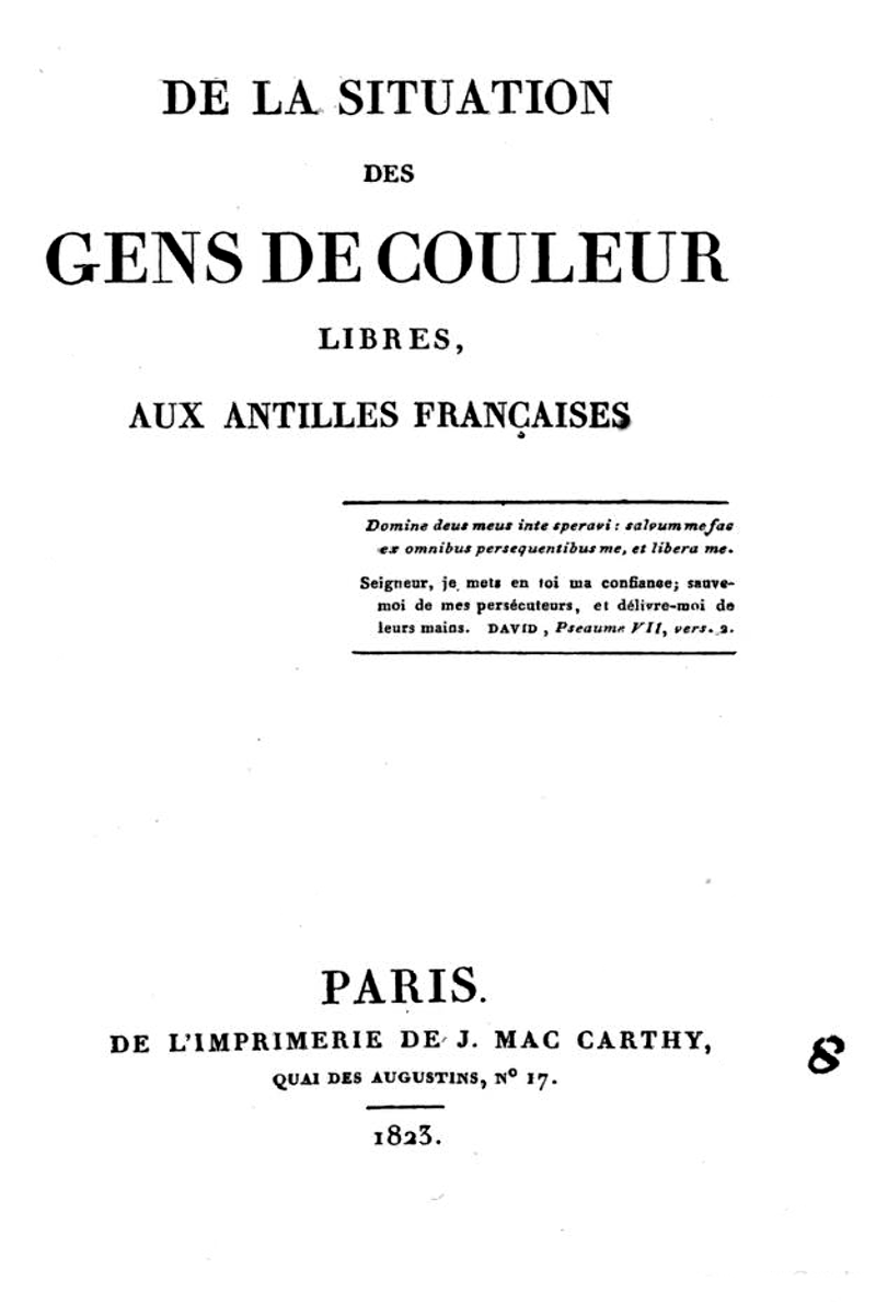 Laisné de Villévêque, Cyrille Bissette, Gabriel Jacques de Sainte-Croix et Darmiant - De la situation des gens de couleur libres aux Antilles francaises, 1823